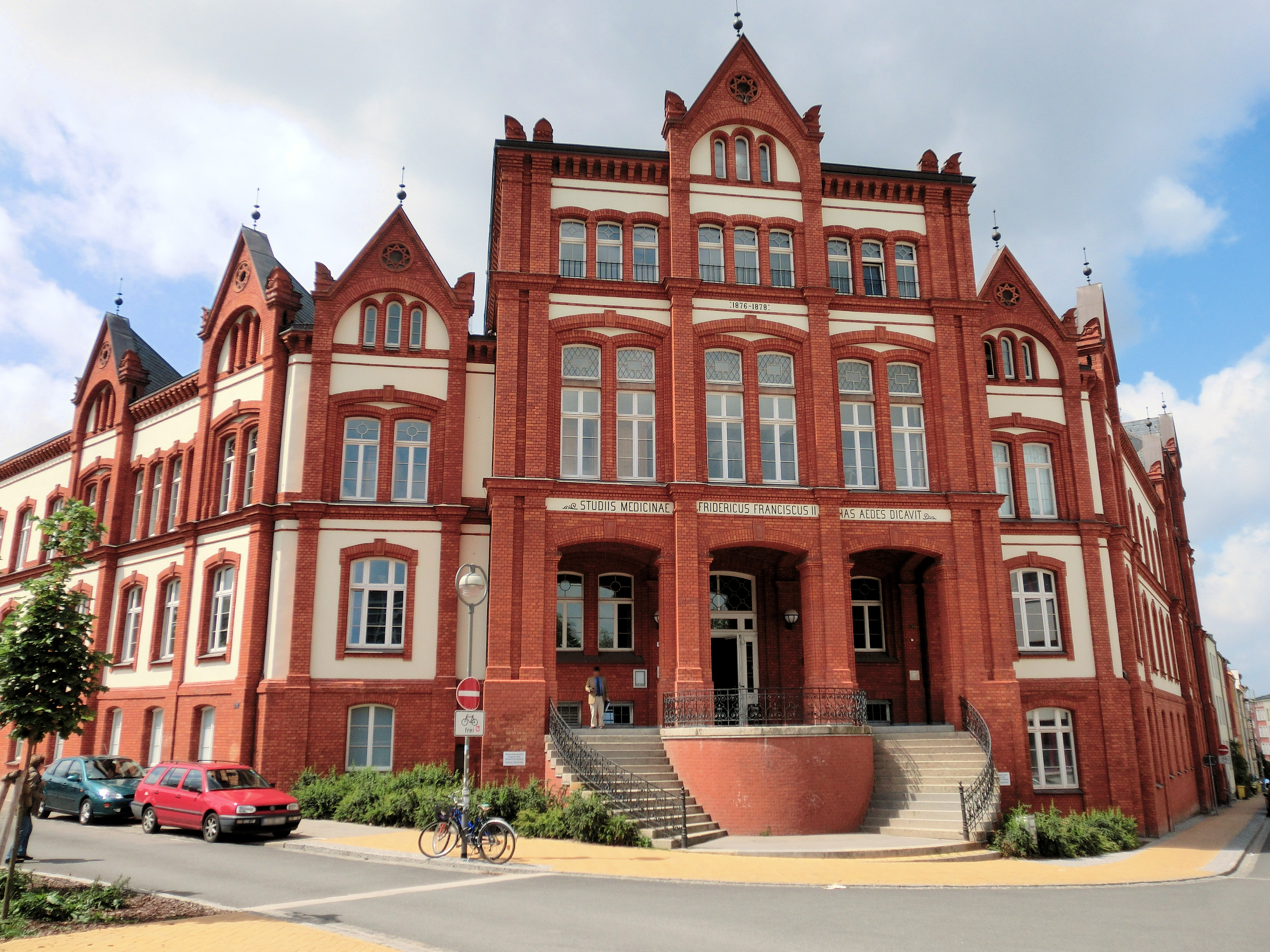 Anatomisches Institut (Baudenkmal, Rostock, Gertrudenstraße 9-10)